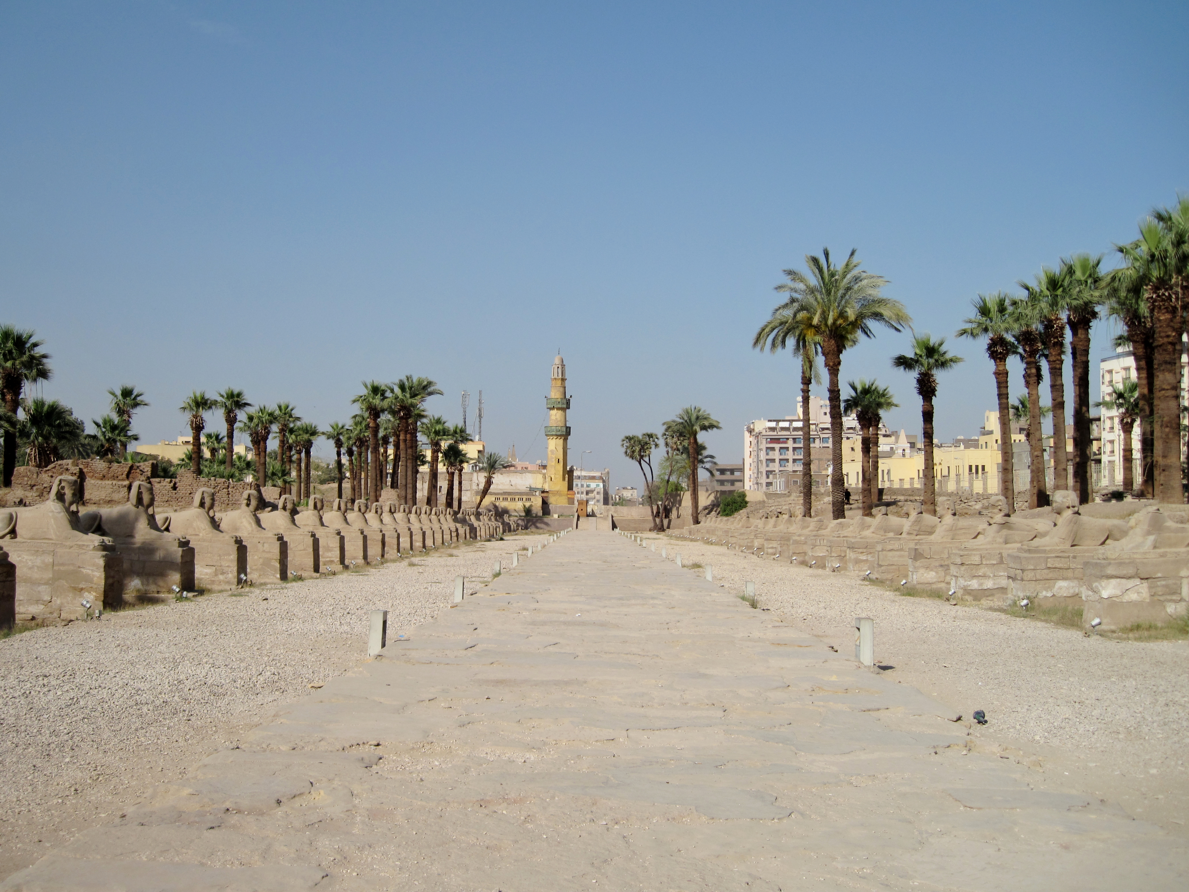 Sphinxallee vor dem Tempel von Luxor, Ägypten